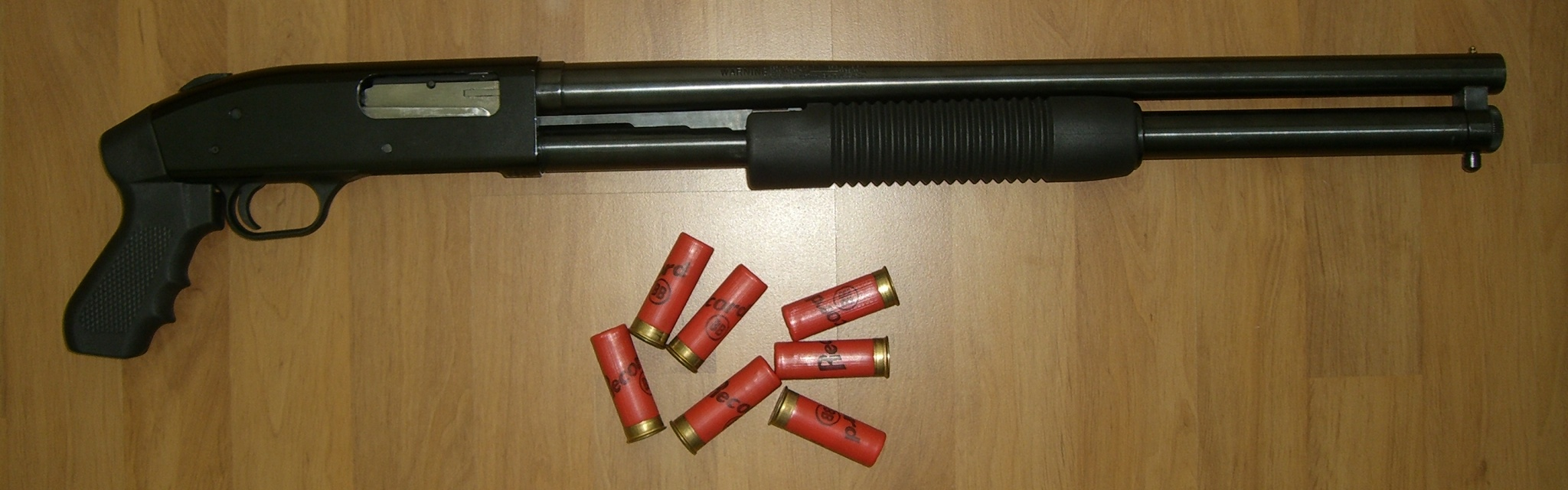 Помповое ружьё Mossberg 500A 12-го калибра в варианте со стволом длиной 20 дюймов, пистолетной рукояткой и магазином на 7-8 патронов.